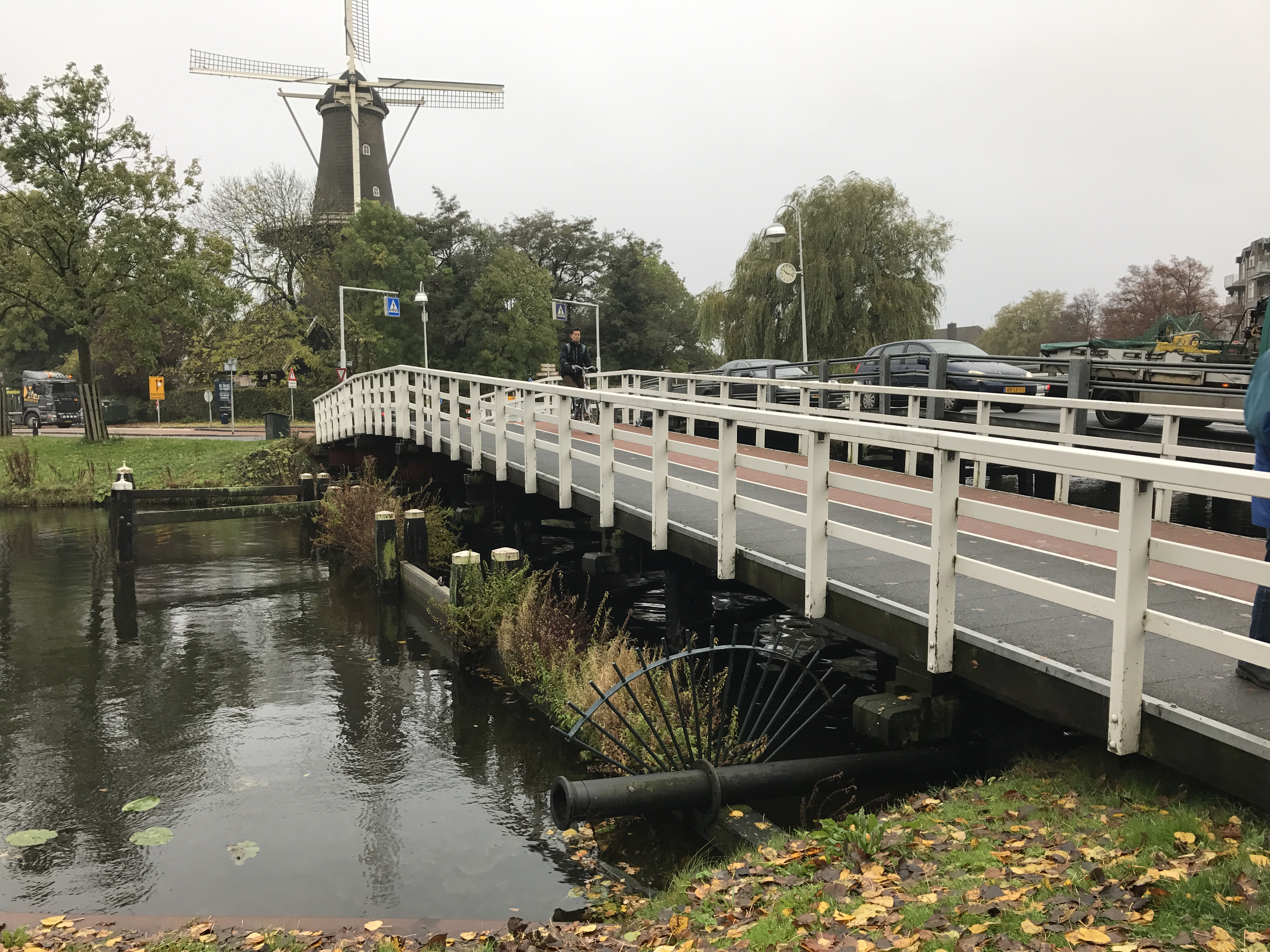 De Valkbrug in Leiden met op de achtergrond de naamgever van de brug, molen 'de Valk'.